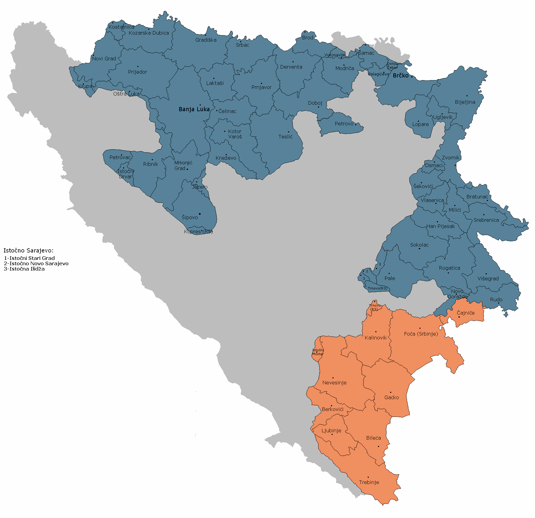 Требињско-фочанска регија према уџбеницима географије